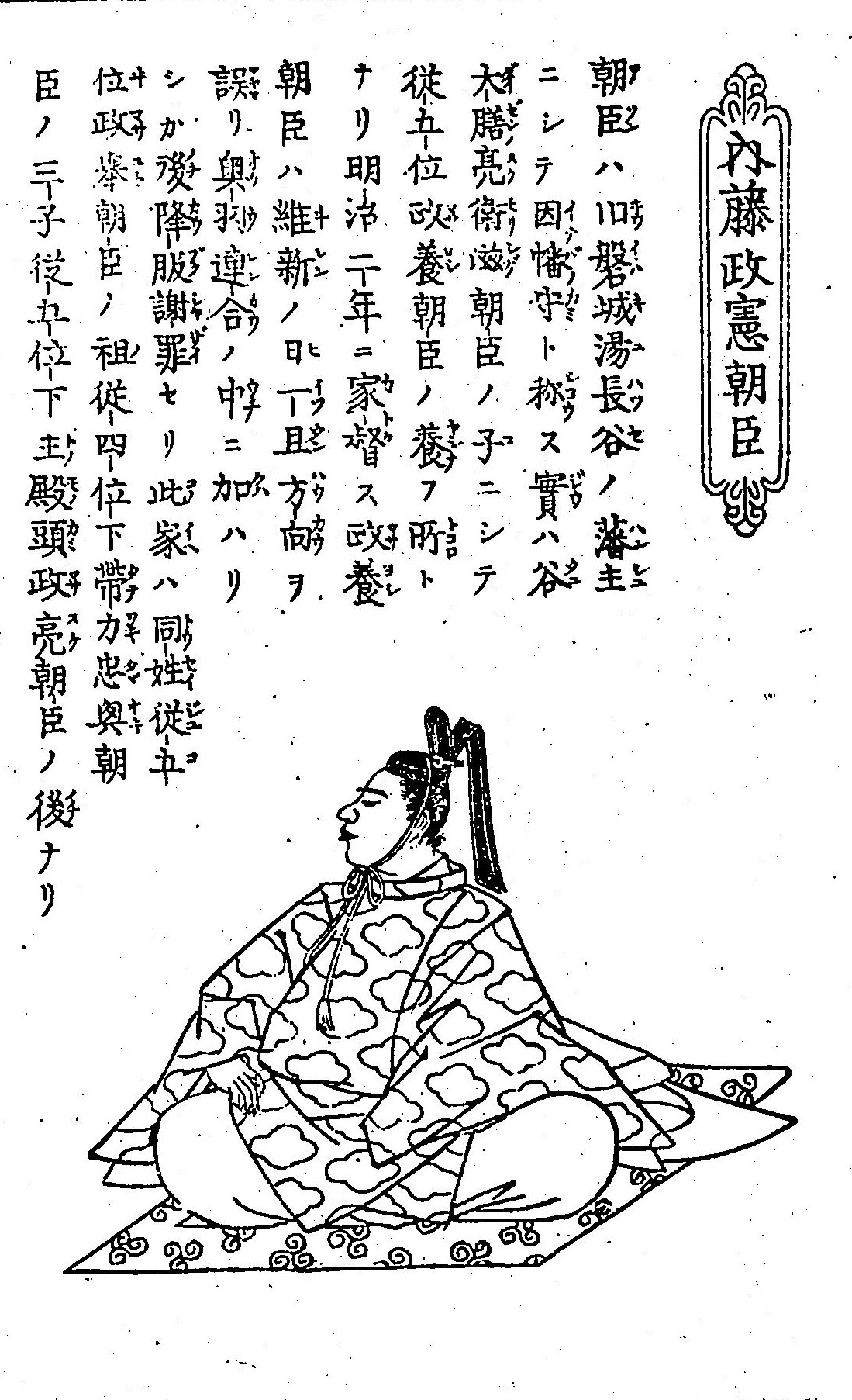 陸奥湯長谷藩最後の藩主・内藤政憲の肖像画。